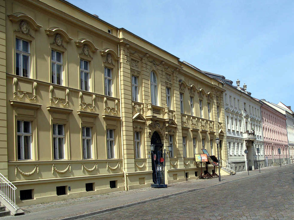 Der Nikolaisaal in Potsdam. (en: Nikolaisaal in Potsdam, Germany)